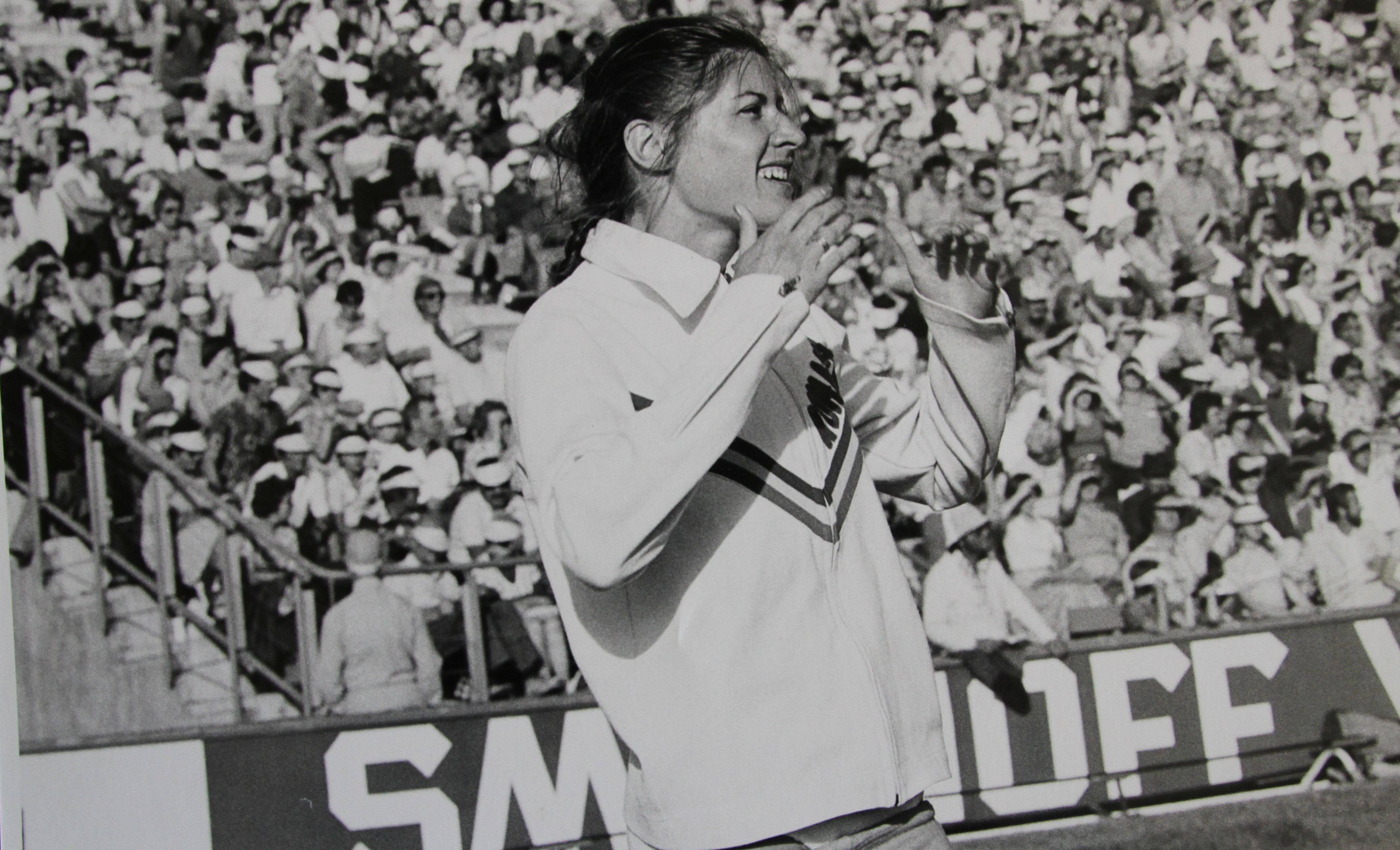 Natalia Mărășescu (Andrei)